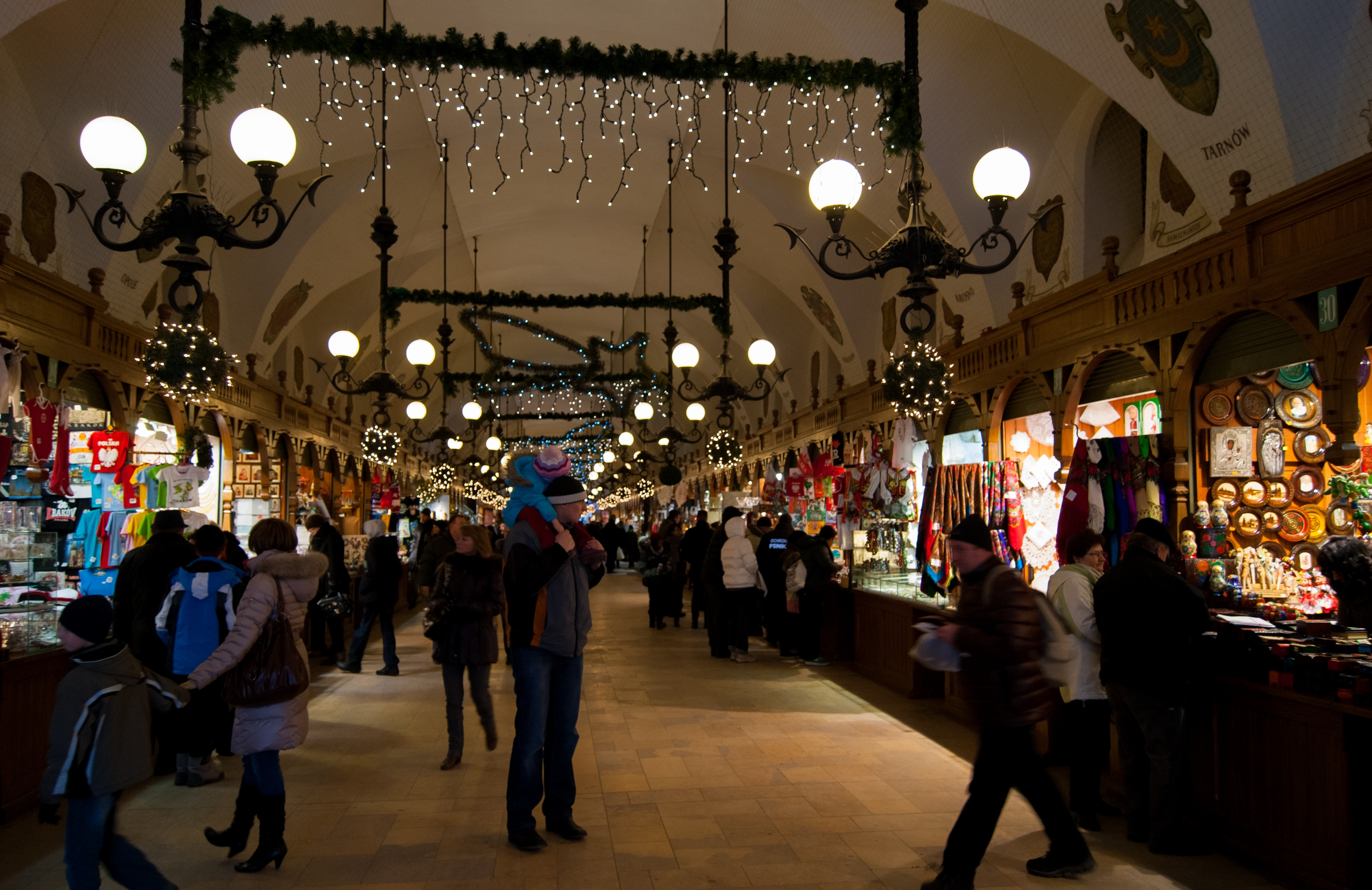 inside Sukiennice (linen hall), Main Square, Kraków, Poland